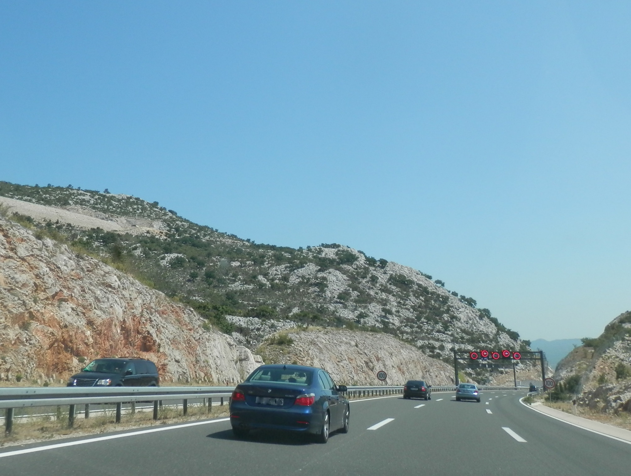 Diaľnica A1 Záhreb-Split. Chorvátsko, leto 2013.